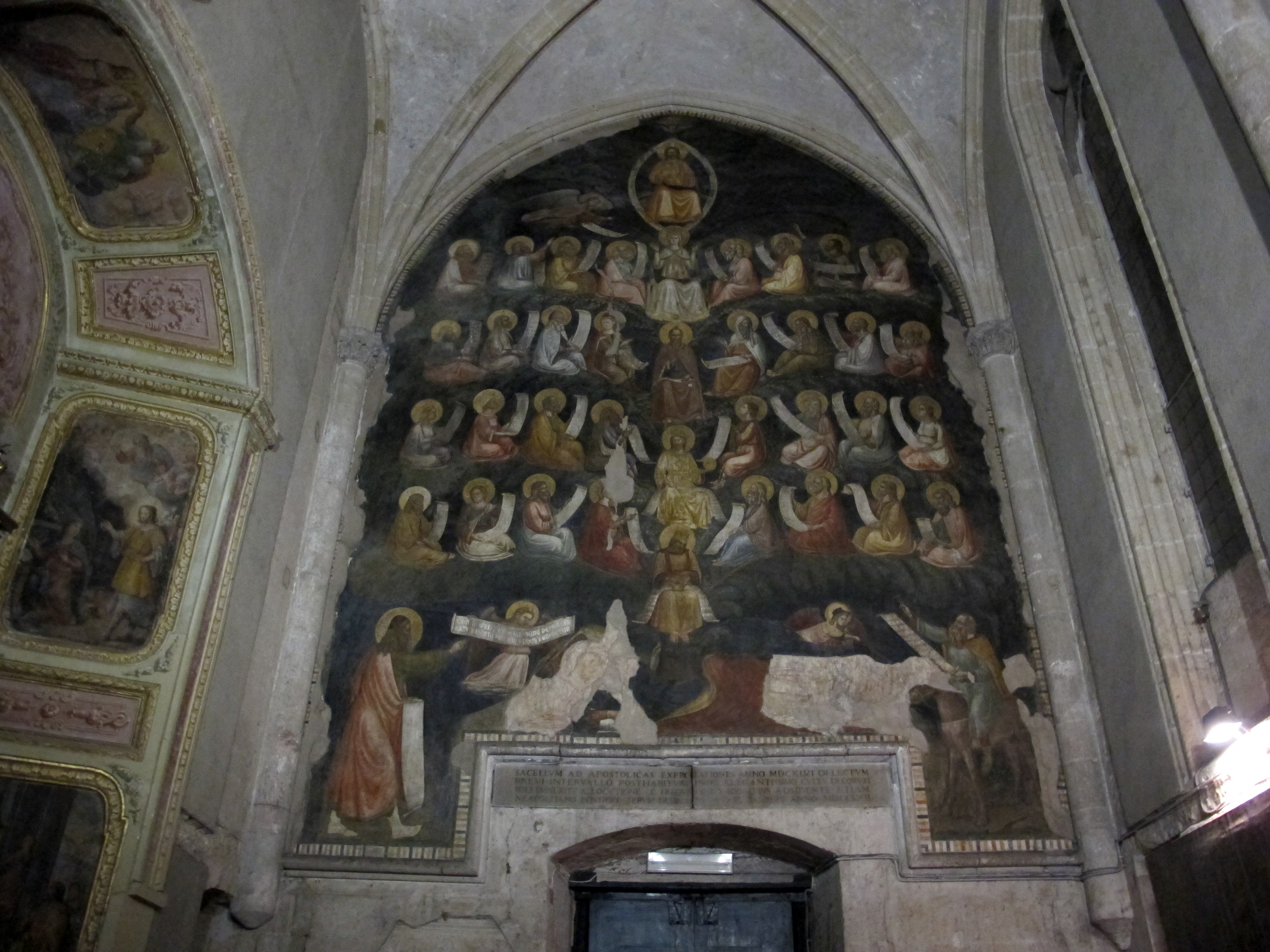 Duomo di Napoli